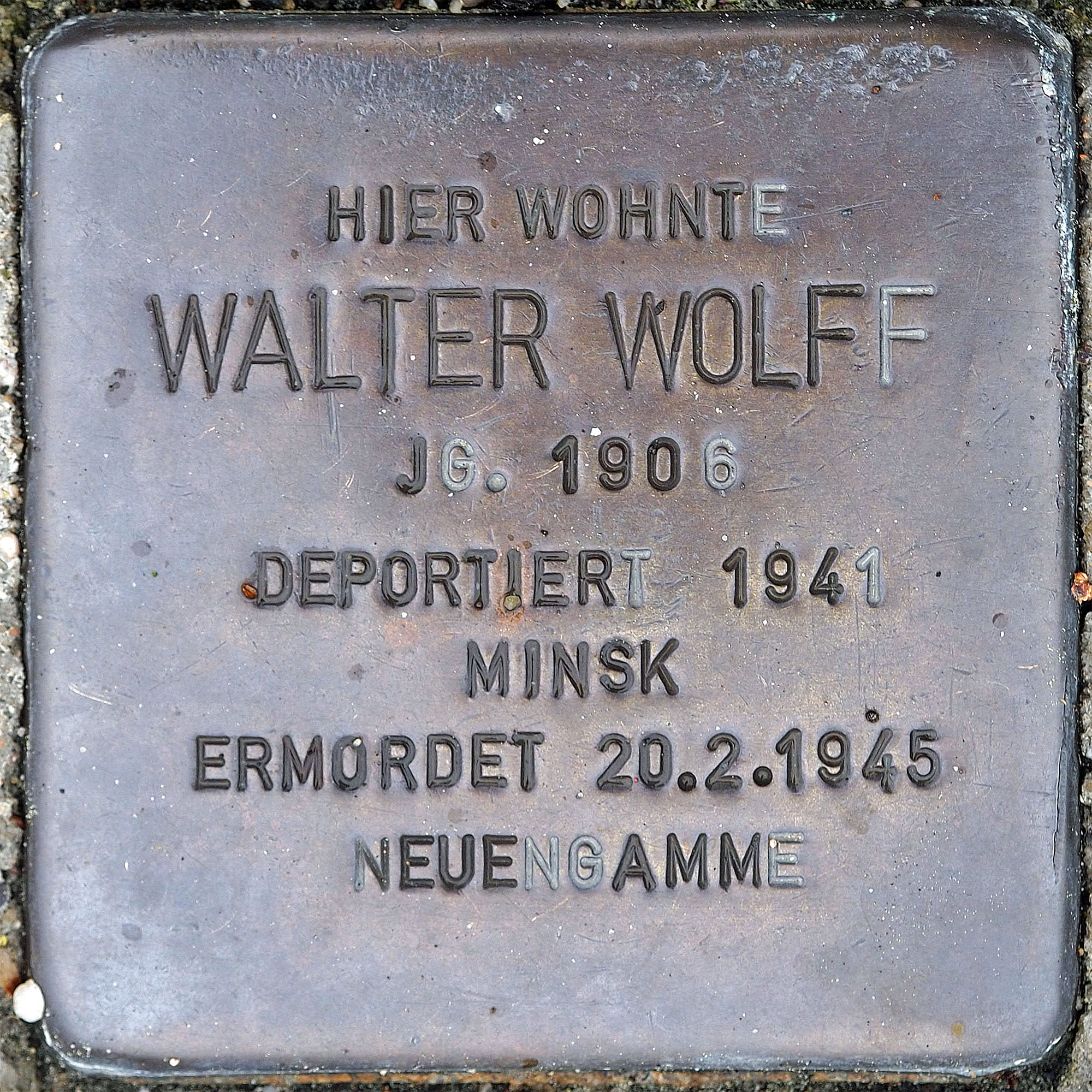 Stolpersteine Korschenbroich: Wolff, Walter